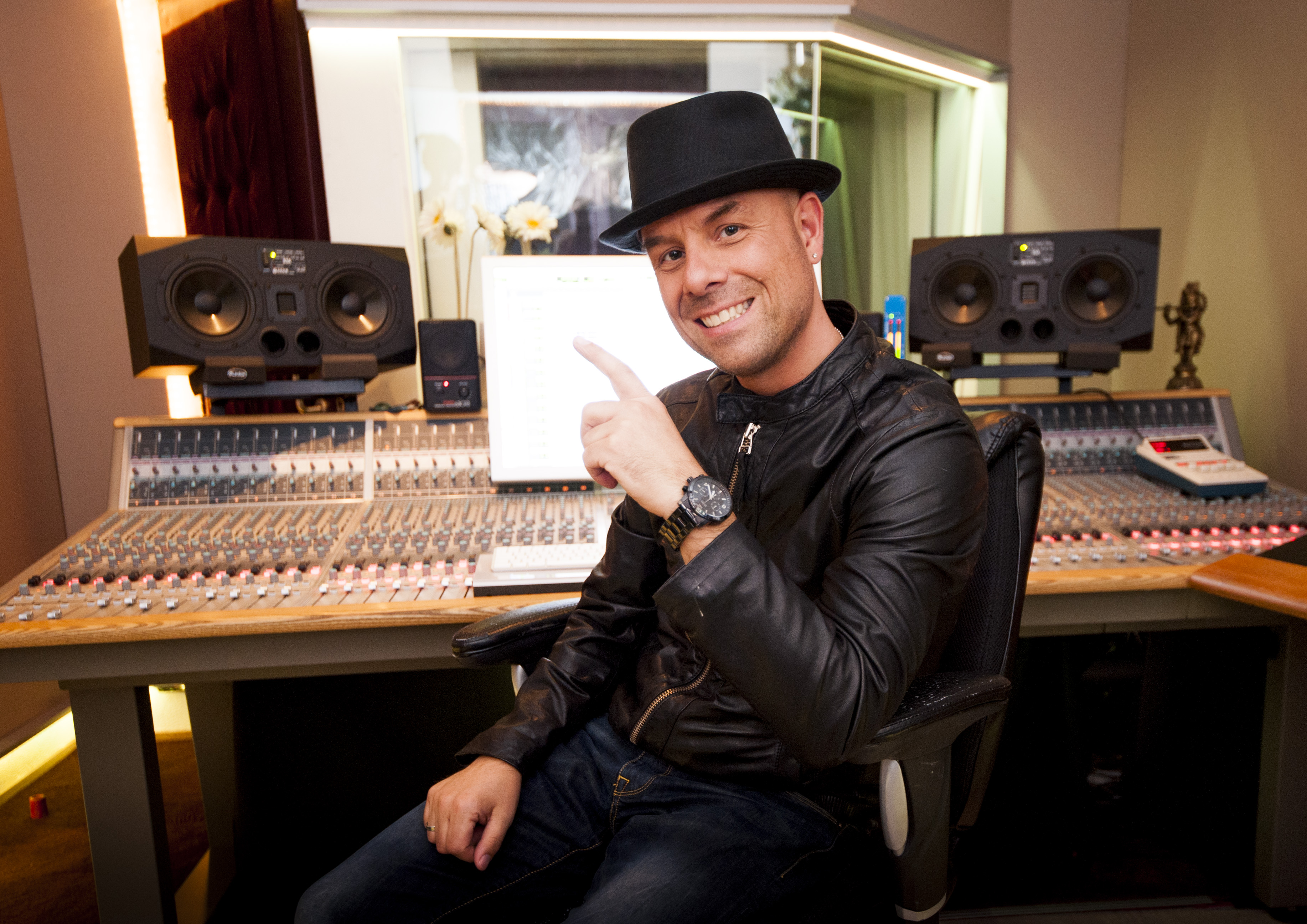 Nederlands muzikant